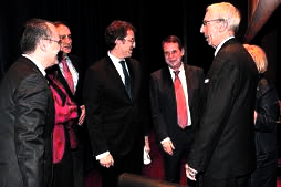 foto de algunos componentes de la asociacion